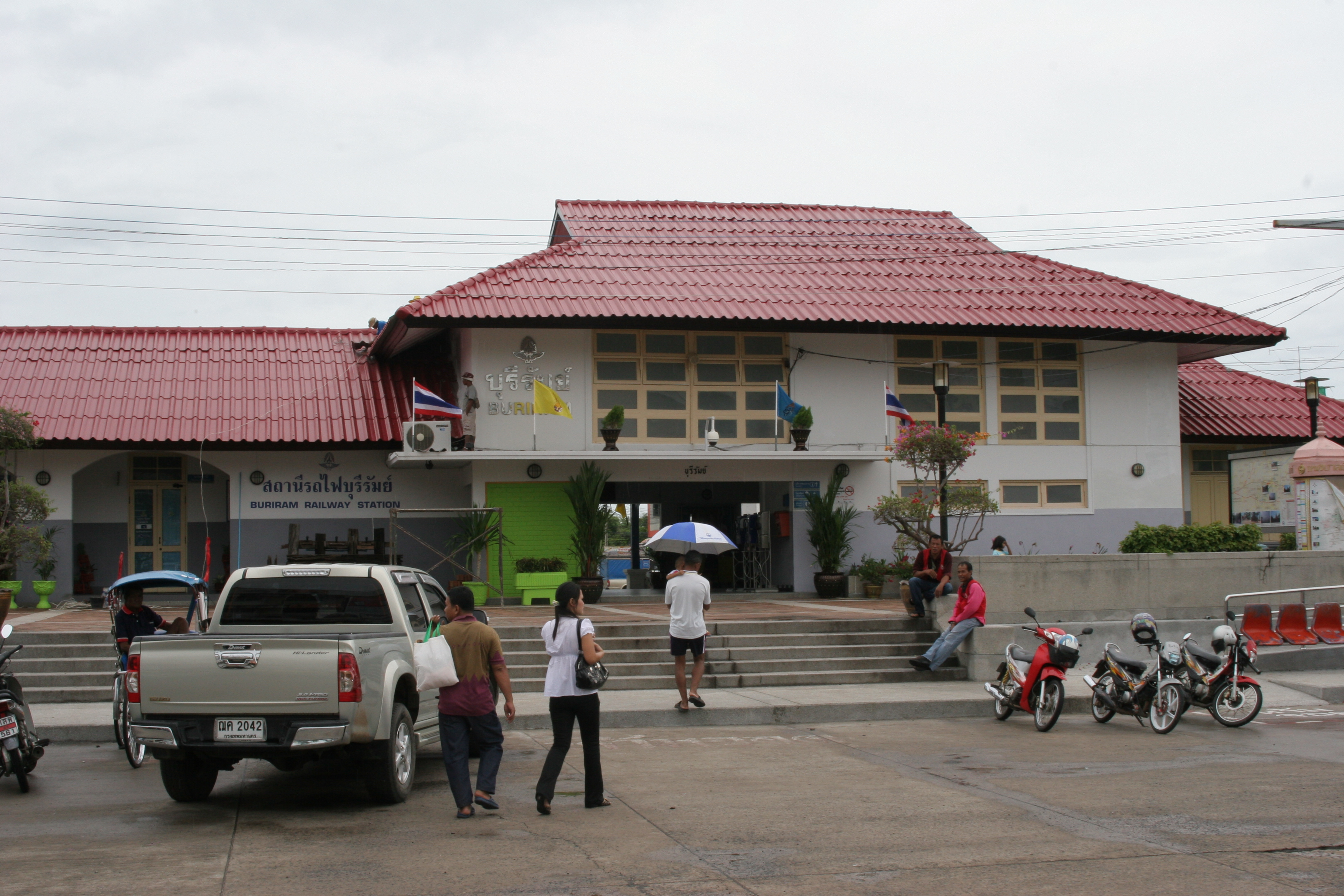 ブリーラム駅